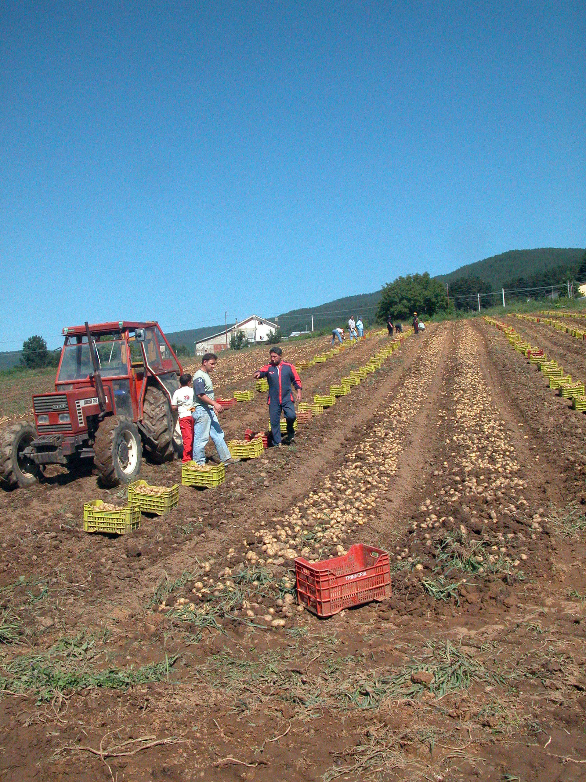 Récolte des pommes de terre à la Sila (Calabre, Italie) ; tracteur Fiat 766 (DT?)